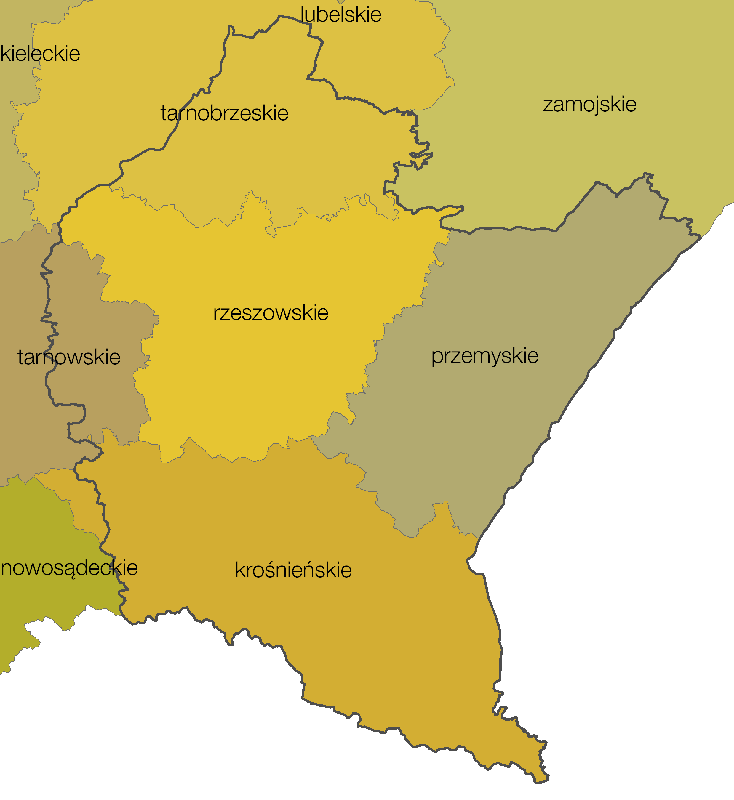 Województwo podkarpackie (od 1999) jako powstałe z województw podziału administracyjnego Polski z lat 1975-1998